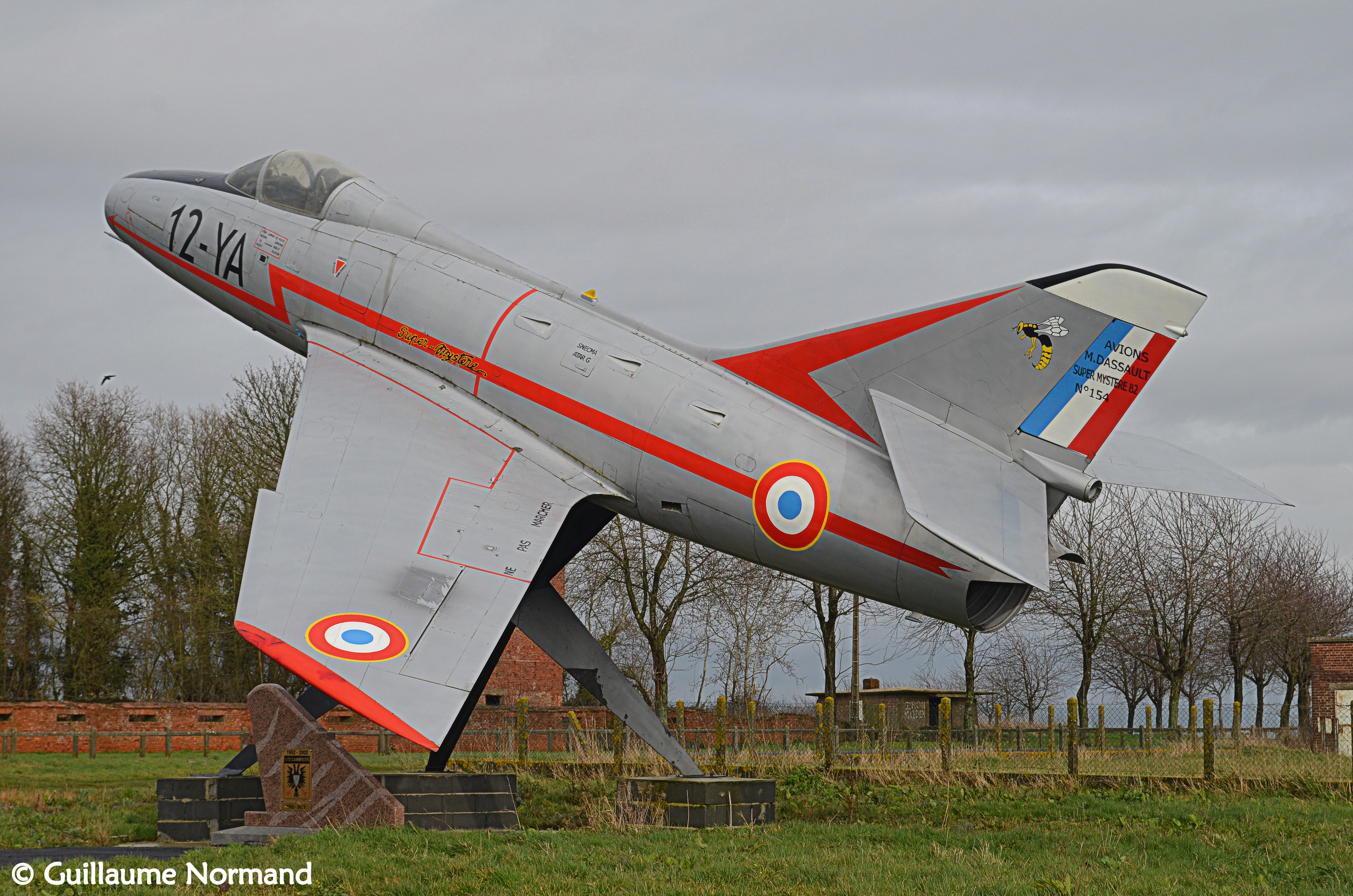 At LFYG